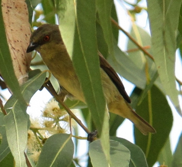 Apía, Risaralda, Colombia